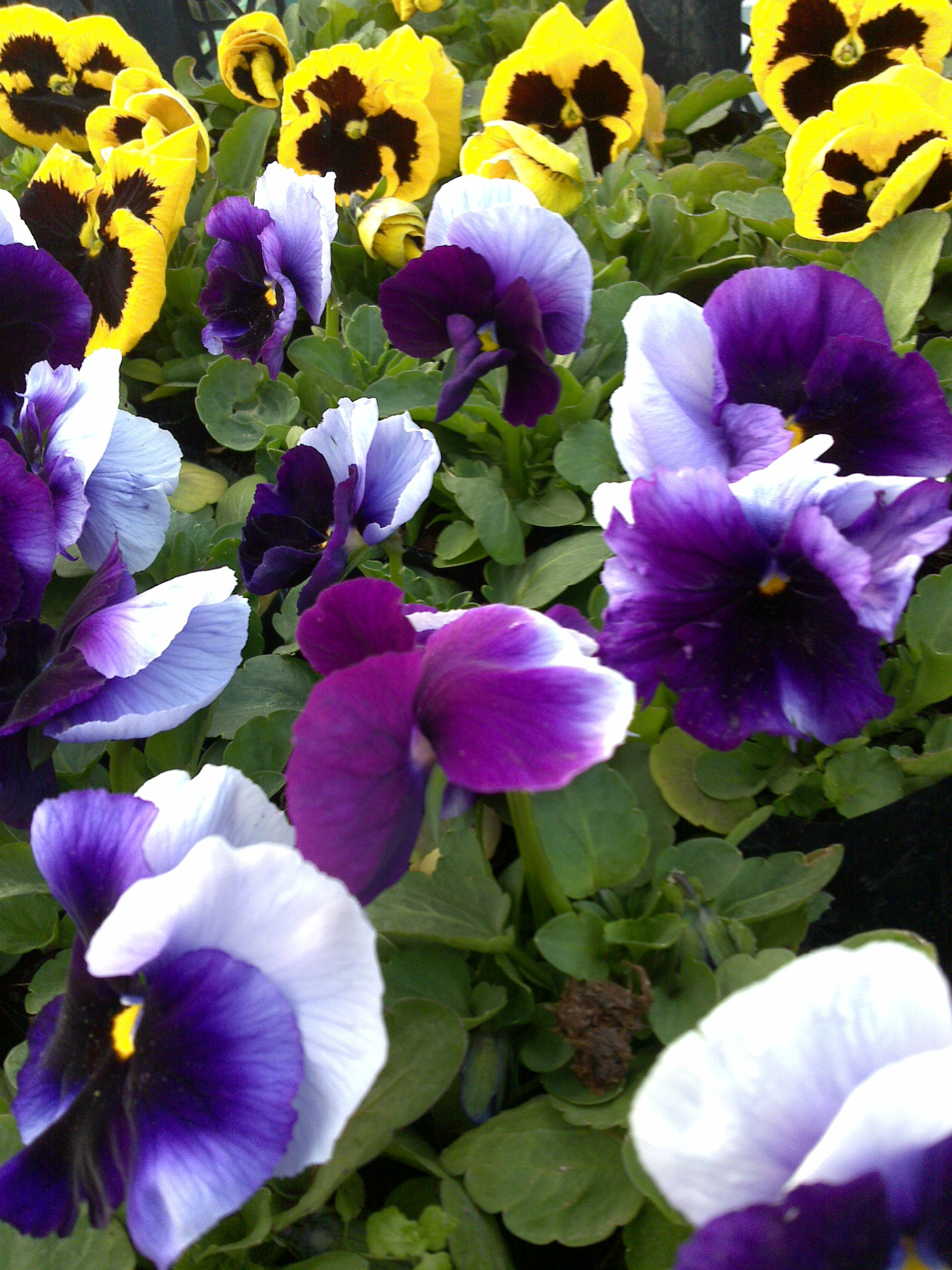 Hercai Menekşe (Viola tricolor )